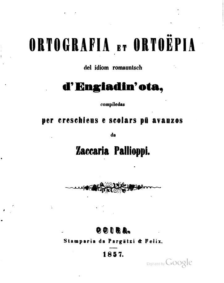 Rumantsch: Ortografia et ortoëpia del idiom romauntsch d'Engiadin'ota, compiledas per creschieus et scolars pü avanzos, frontispizi